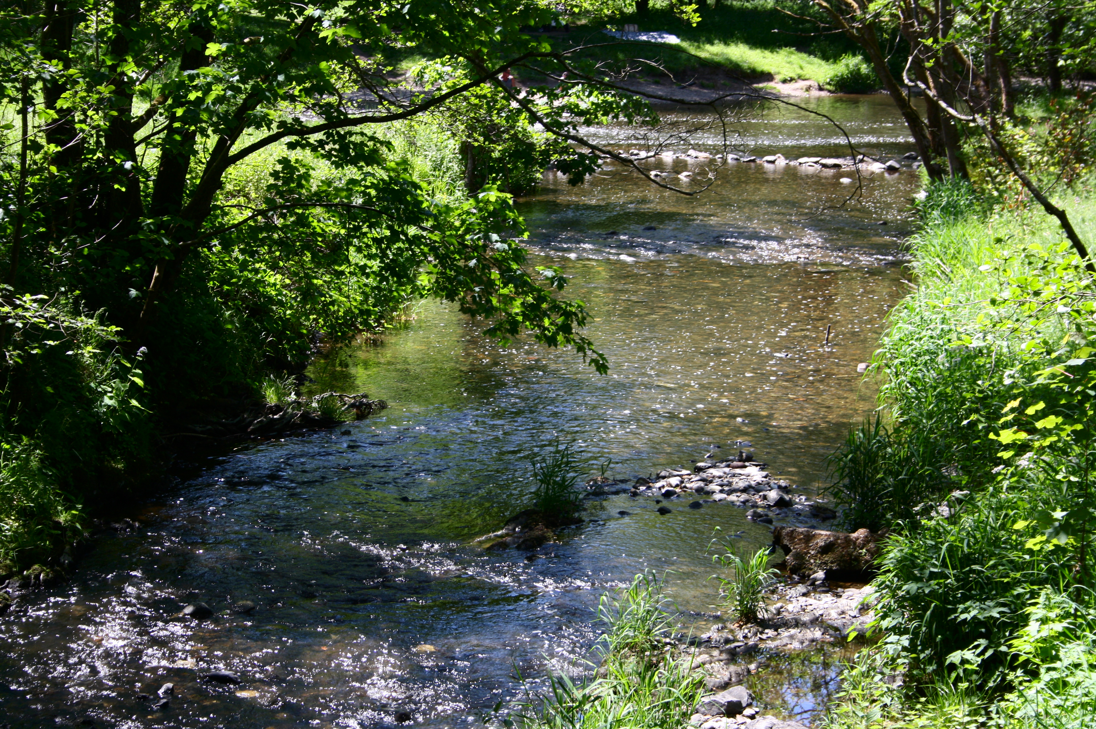 Die Kleine Nister bei Heimborn, Westerwald, Rheinland-Pfalz, Deutschland